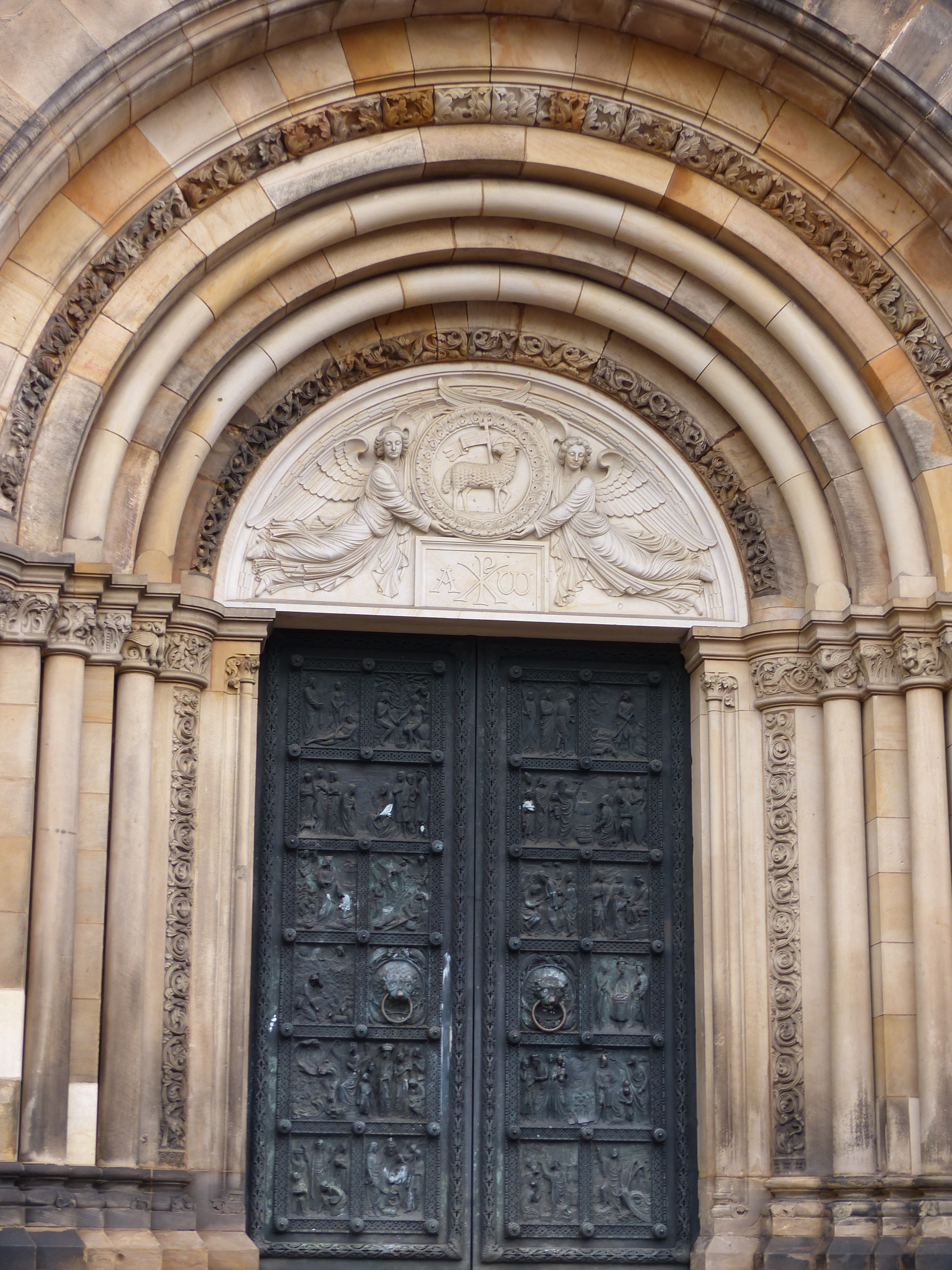 Linkes Westportal des Bremer Doms, Gewände